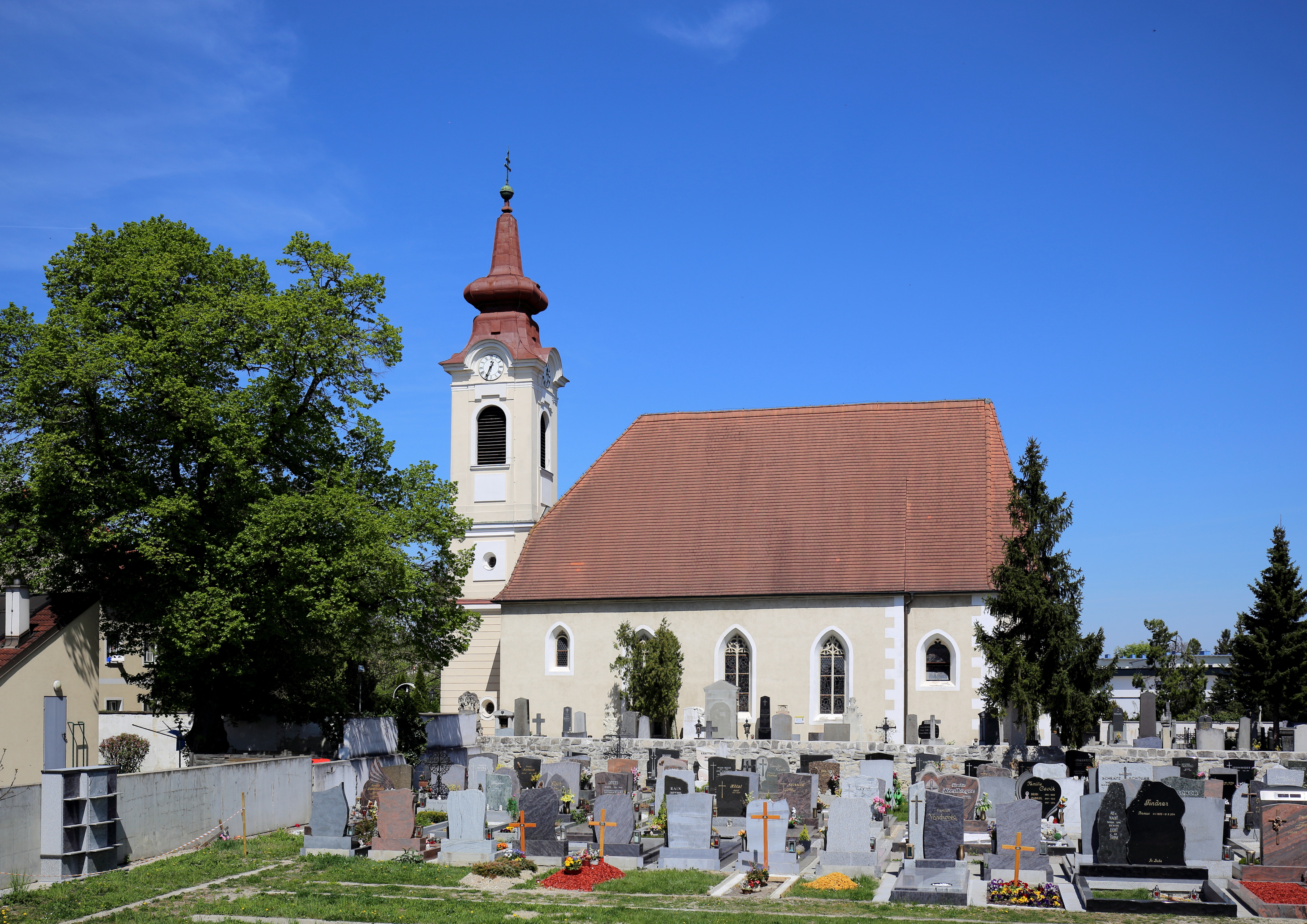 Südsüdwestansicht der katholischen Pfarrkirche hl. Andreas in der niederösterreichischen Stadt Ebreichsdorf. Ein gotischer Sakralbau mit romanischer Kernsubstanz. Der barocke vorgestellte dreizonige Westturm mit Zwiebelhelm wurde 1784 errichtet.